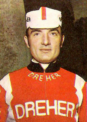 CAMPIONI DELLO SPORT PANINI 1970 1971 ADRIANO PASSUELLO CICLISMO